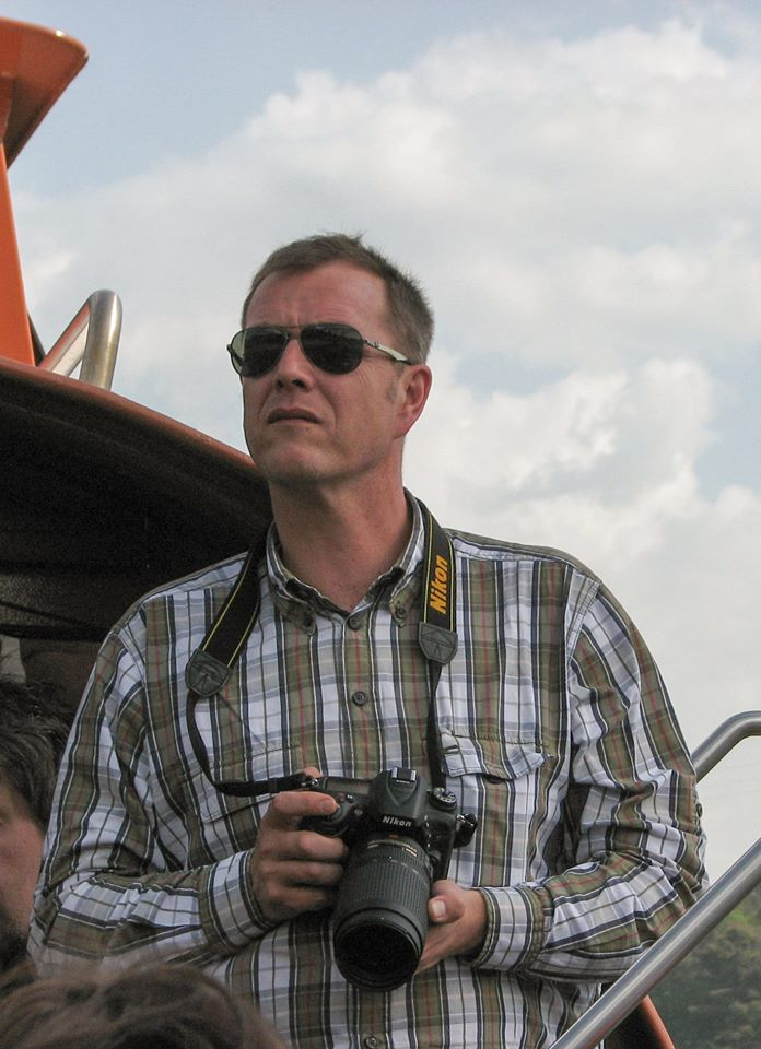 Siniša Viđak